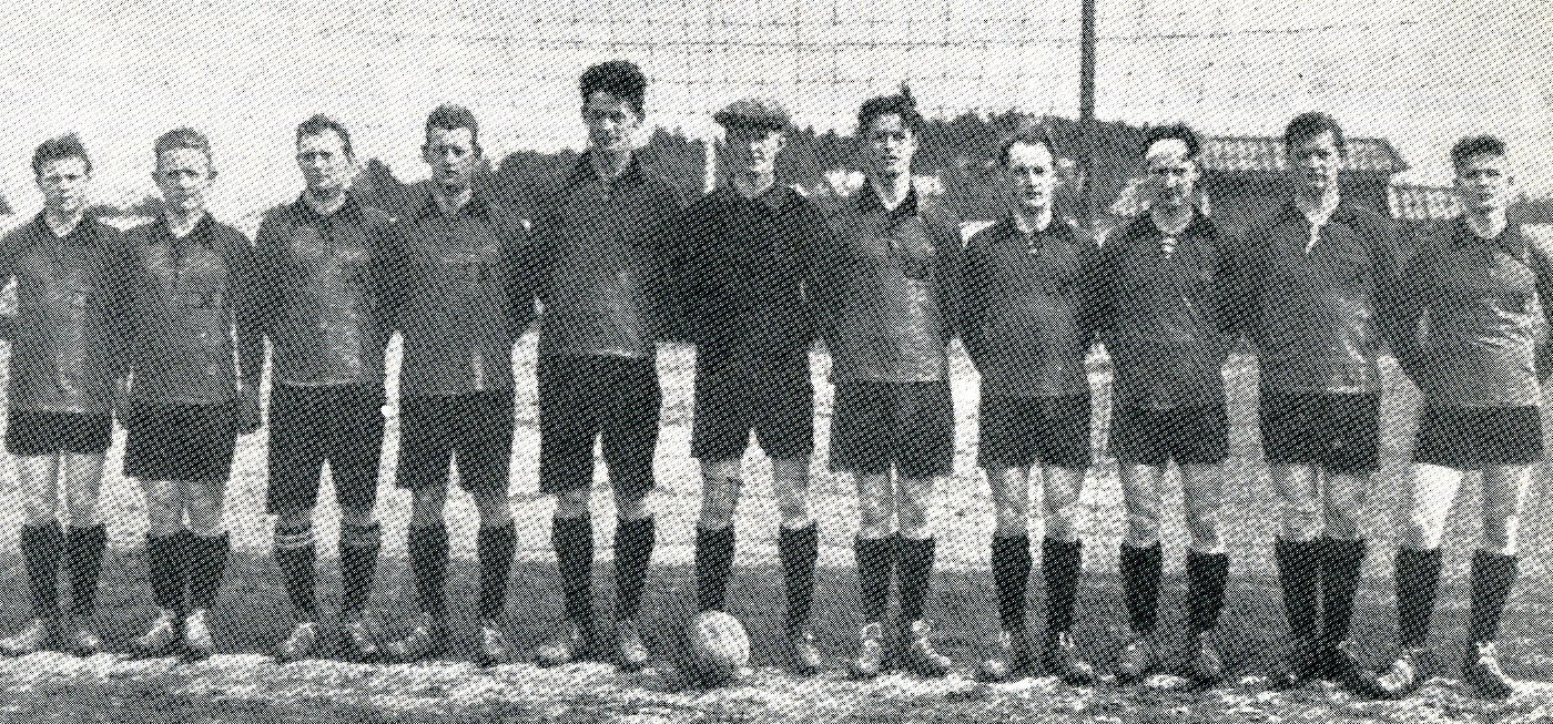 Sandefjord Ballklubb 1925